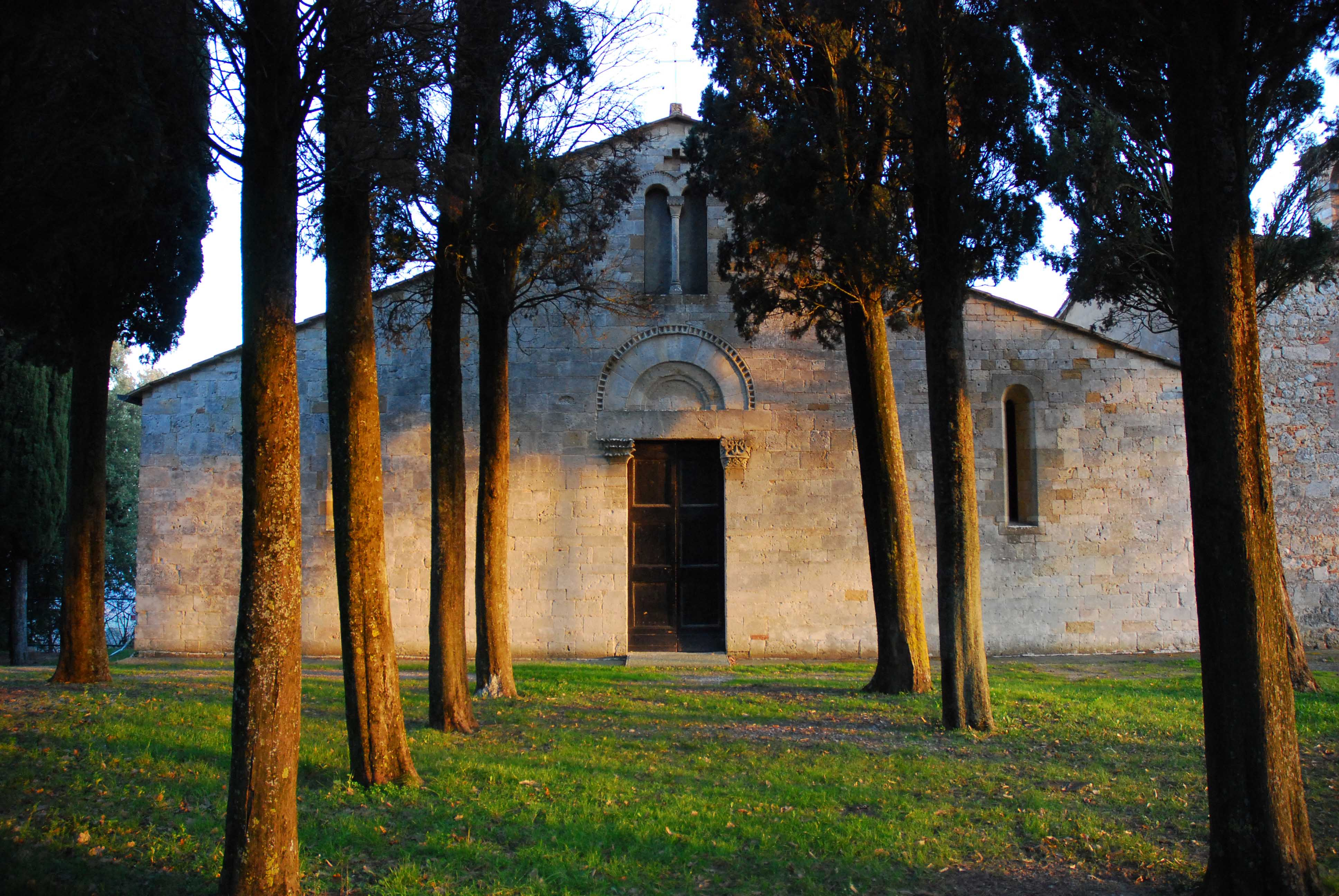 Pieve di Cèllole (San Gimignano)